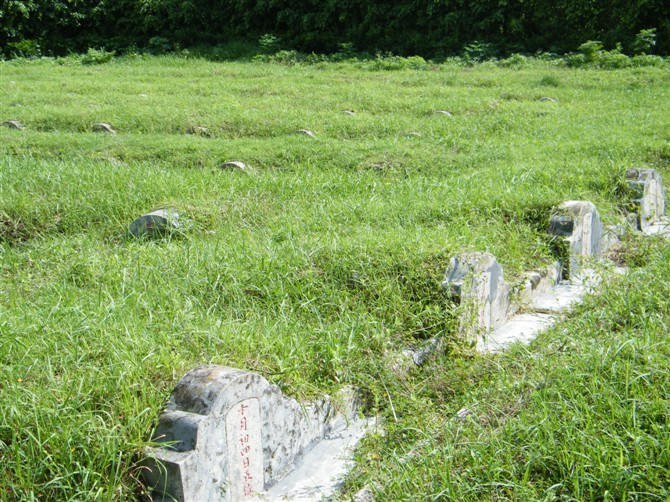 达濠万人墓。2009.7.26